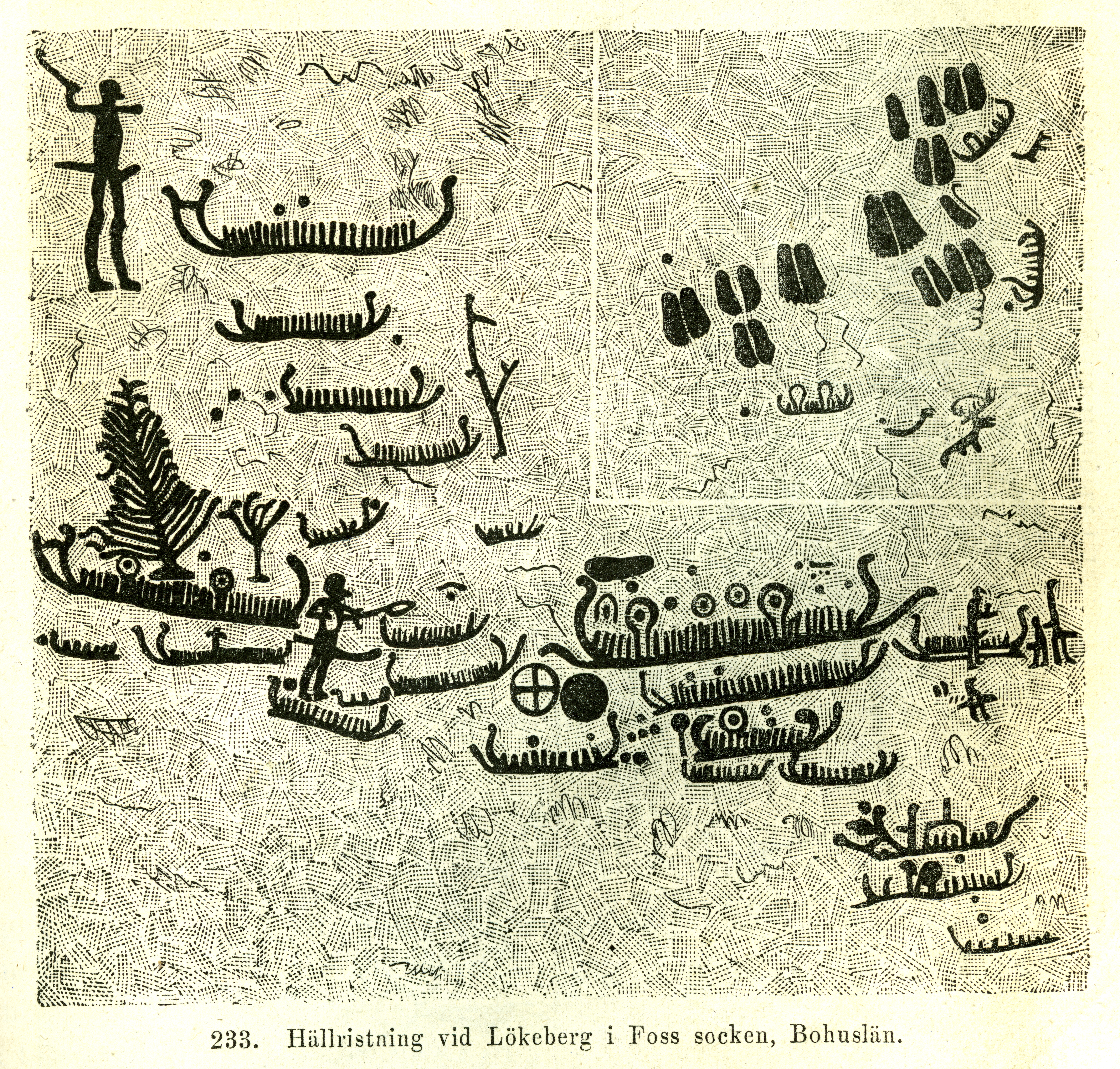 Hällristning vid Lökeberg i Foss socken, Bohuslän, Västra Götalands län, Sverige. Figur 233 på sidan 161 i Sveriges hednatid, samt medeltid, förra skedet, från år 1060 till år 1350 (1877) av Oscar Montelius.